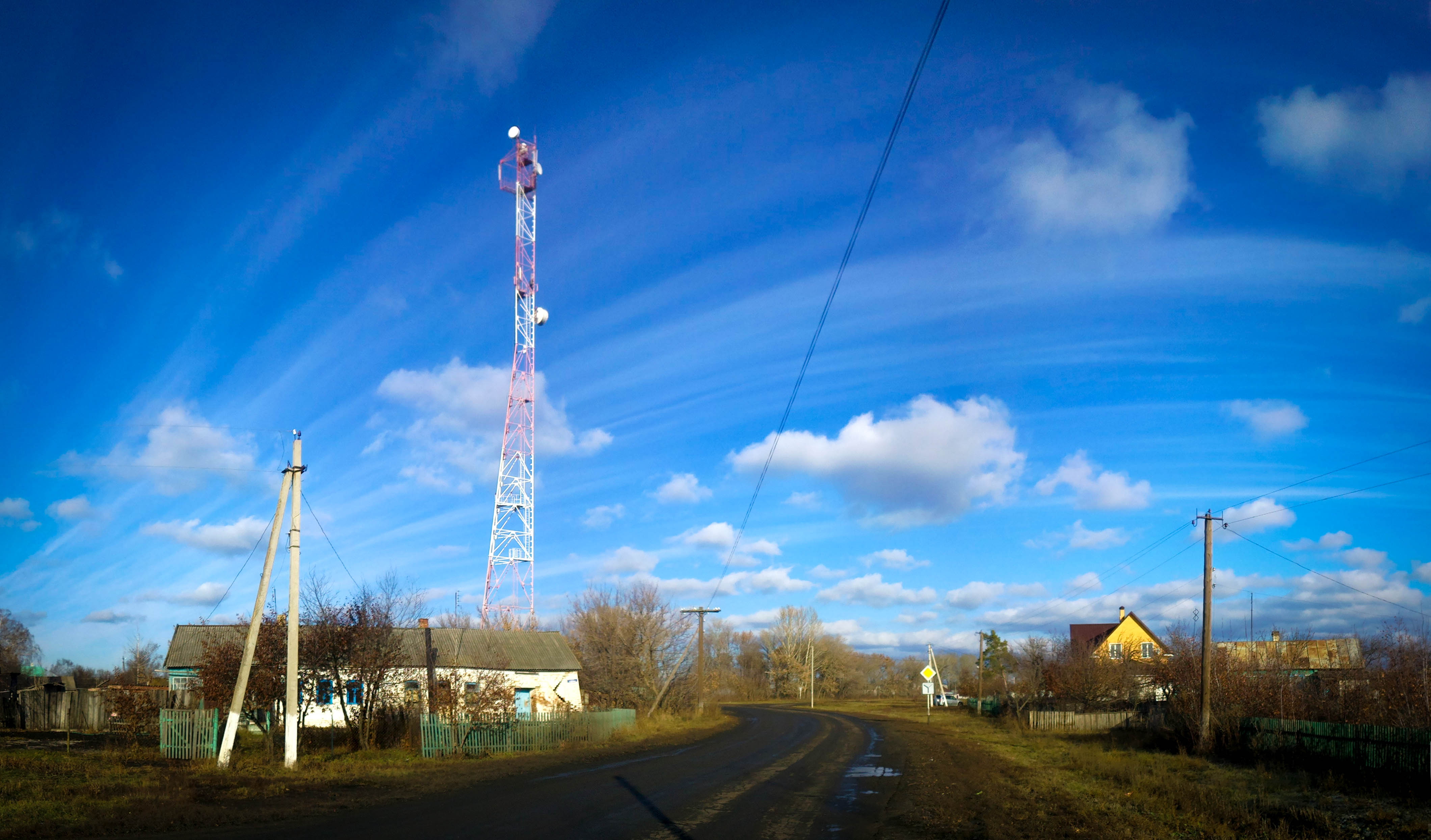 село Шульгино